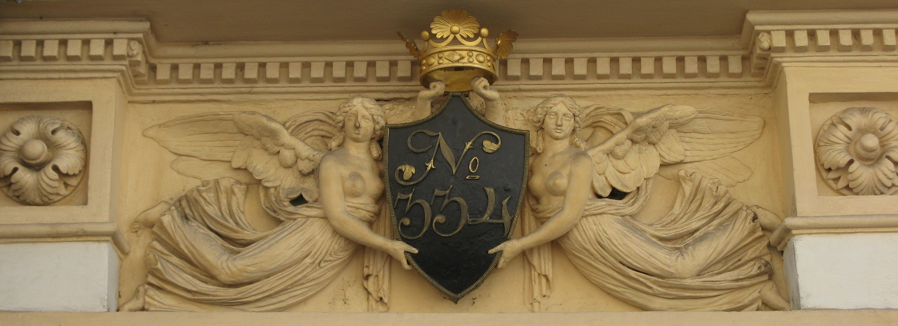 Wappen mit Genien über dem Hauseingang, Favoritenstraße 2, Wien-Wieden